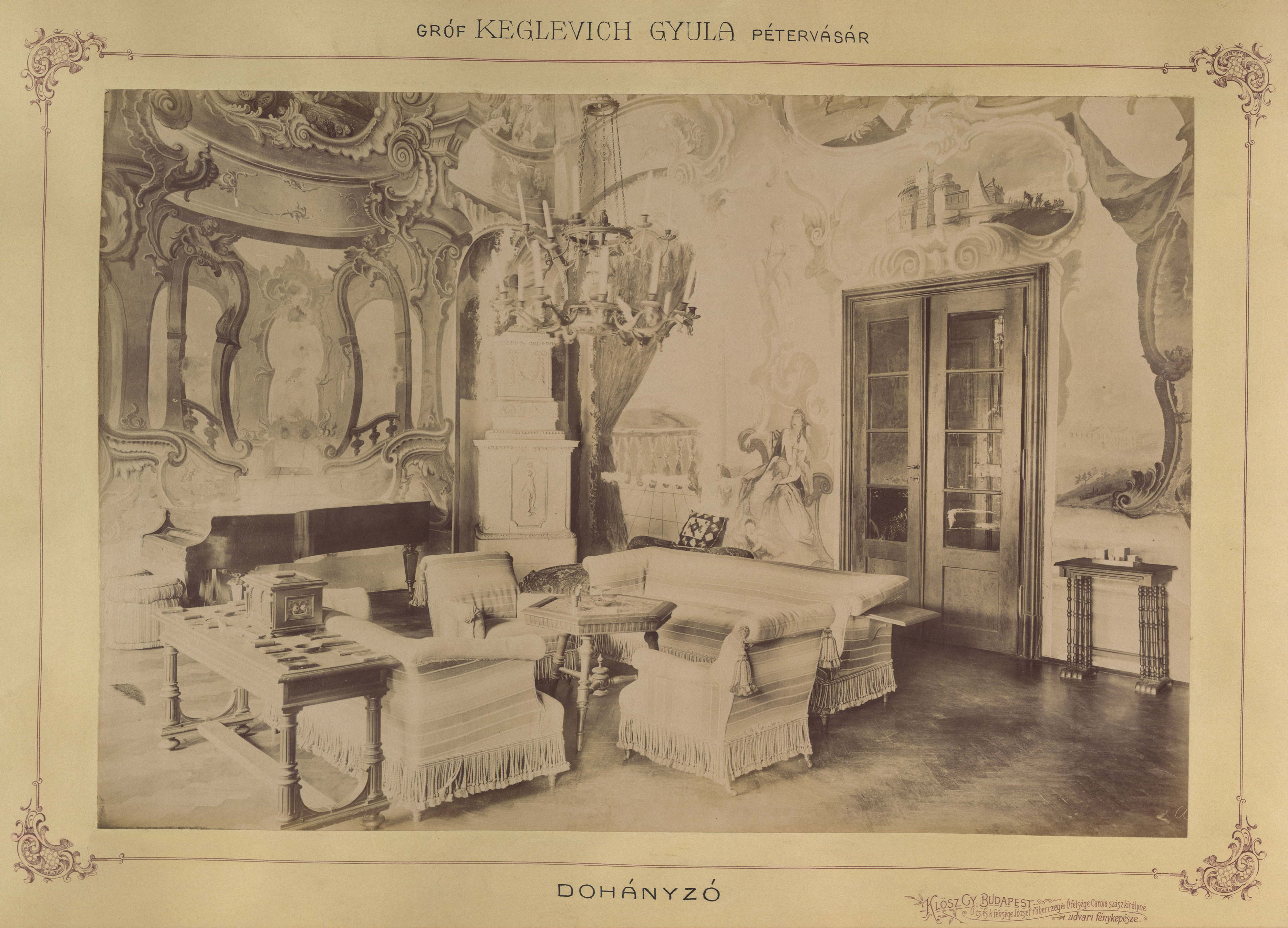 gróf Keglevich Gyula kastélyának dohányzója. A felvétel 1895-1899 között készült. A kép forrását kérjük így adja meg: Fortepan / Budapest Főváros Levéltára. Levéltári jelzet: HU.BFL.XV.19.d.1.12.054 Location: Hungary Tags: interior, chandelier, tile stove, fresco